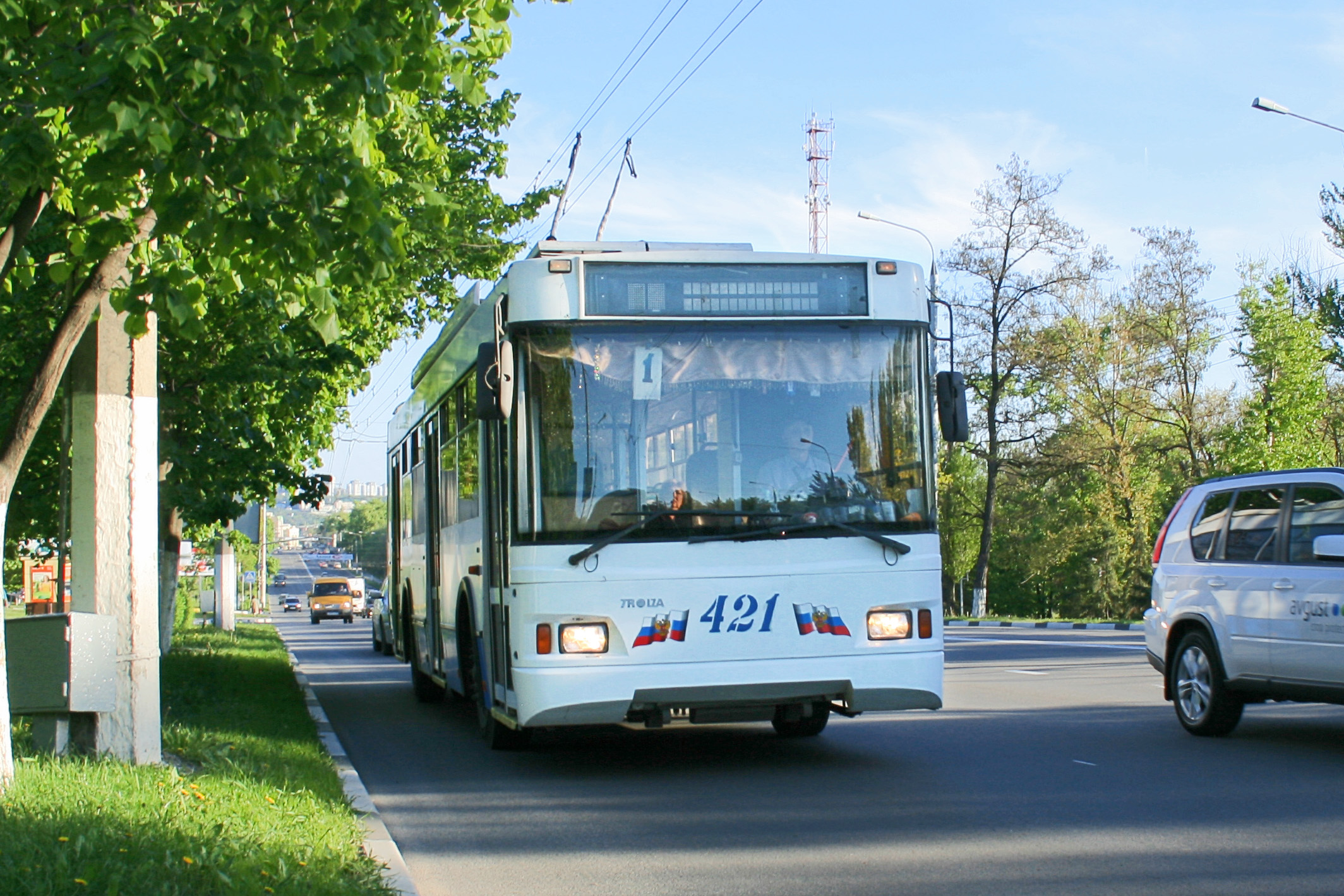 Белгородский троллейбус на проспекте Б. Хмельницкого